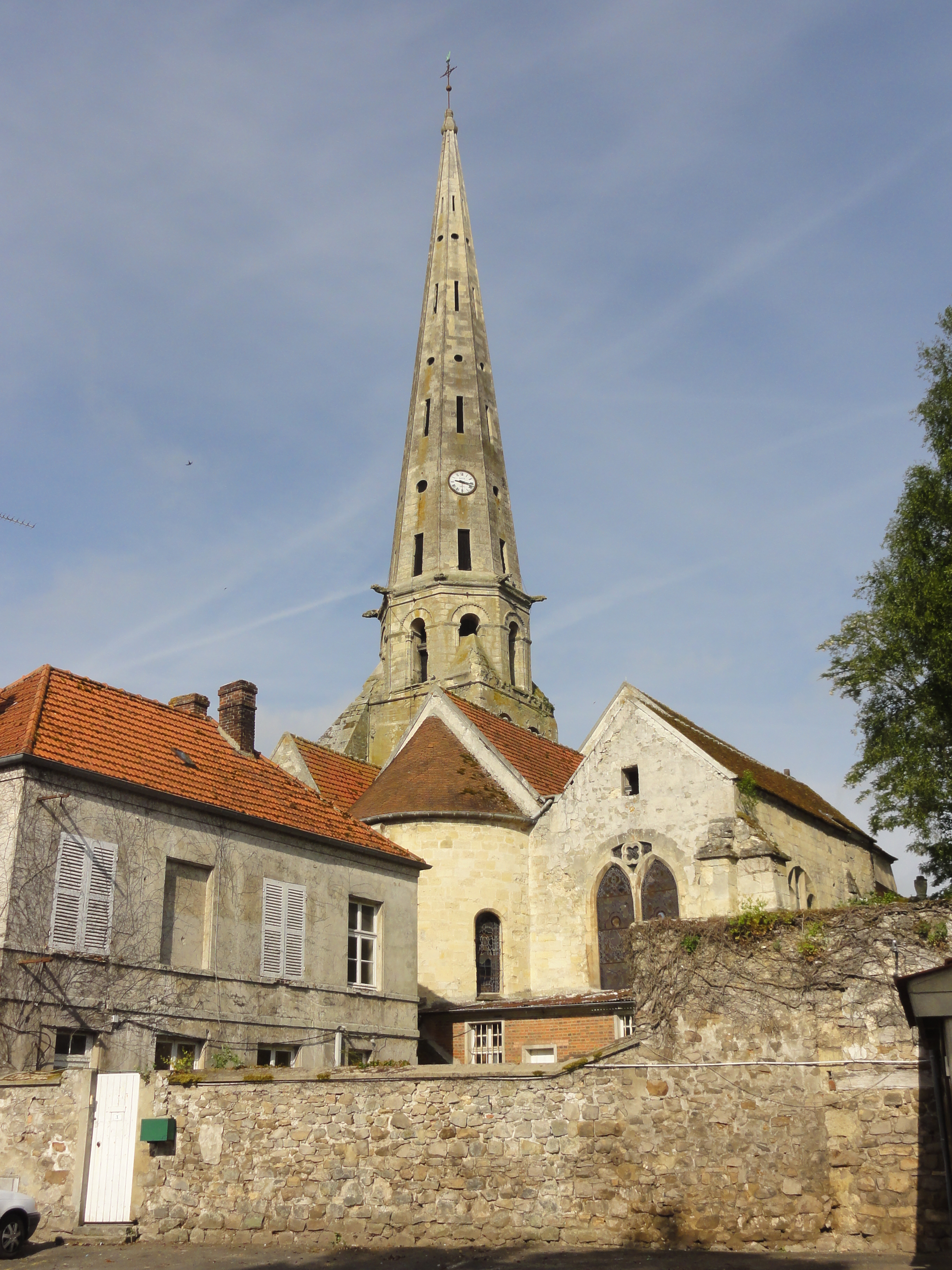 Église Saint-Pierre-et-Saint-Paul d'Acy-en-Multien (voir titre).